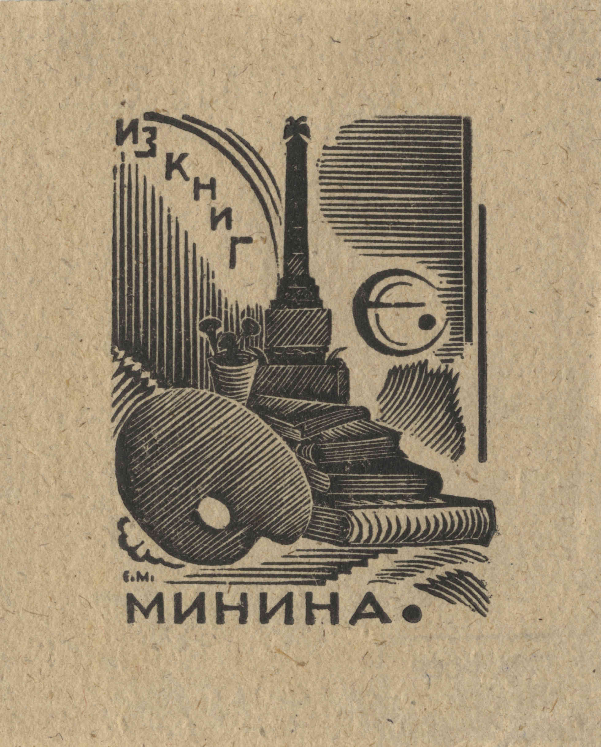 Аўтаэкслібрыс Мінін Ефім, 1927-1929 гг. Папера, ксілаграфія. Аркуш: 8,7х7, выява: 6х4,2 см. Нацыянальны мастацкі музей Рэспублікі Беларусь